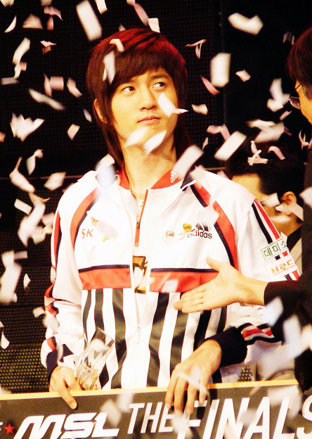 Bisu in 2008